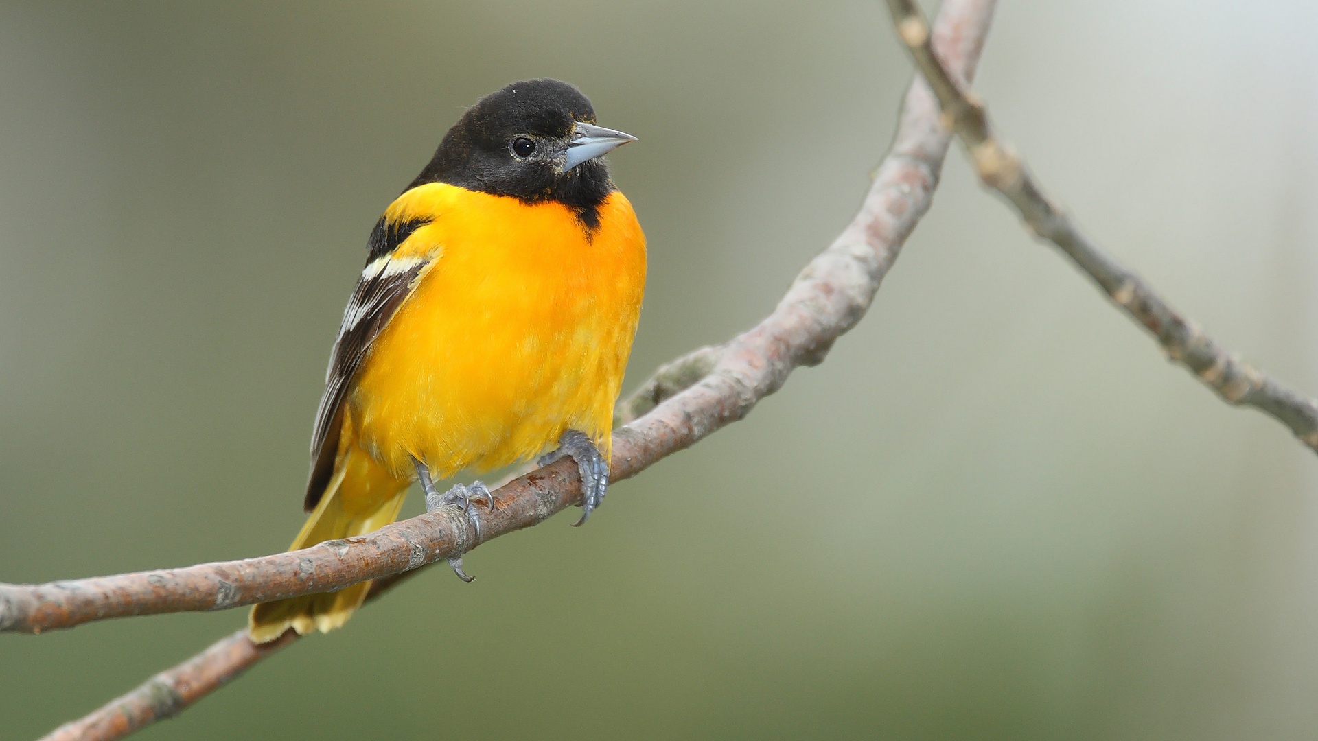 Baltimore Oriole -- Rondeau Provincial Park -- 2008 May